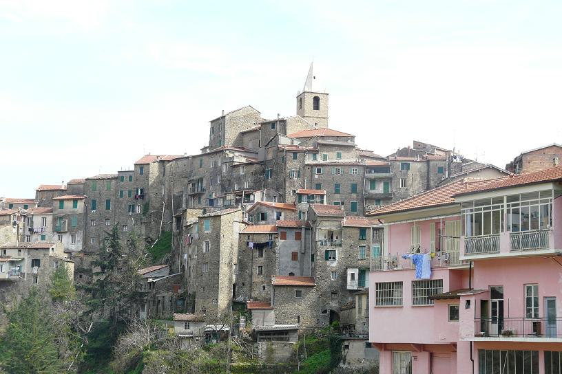 Ceriana, Liguria, Italia